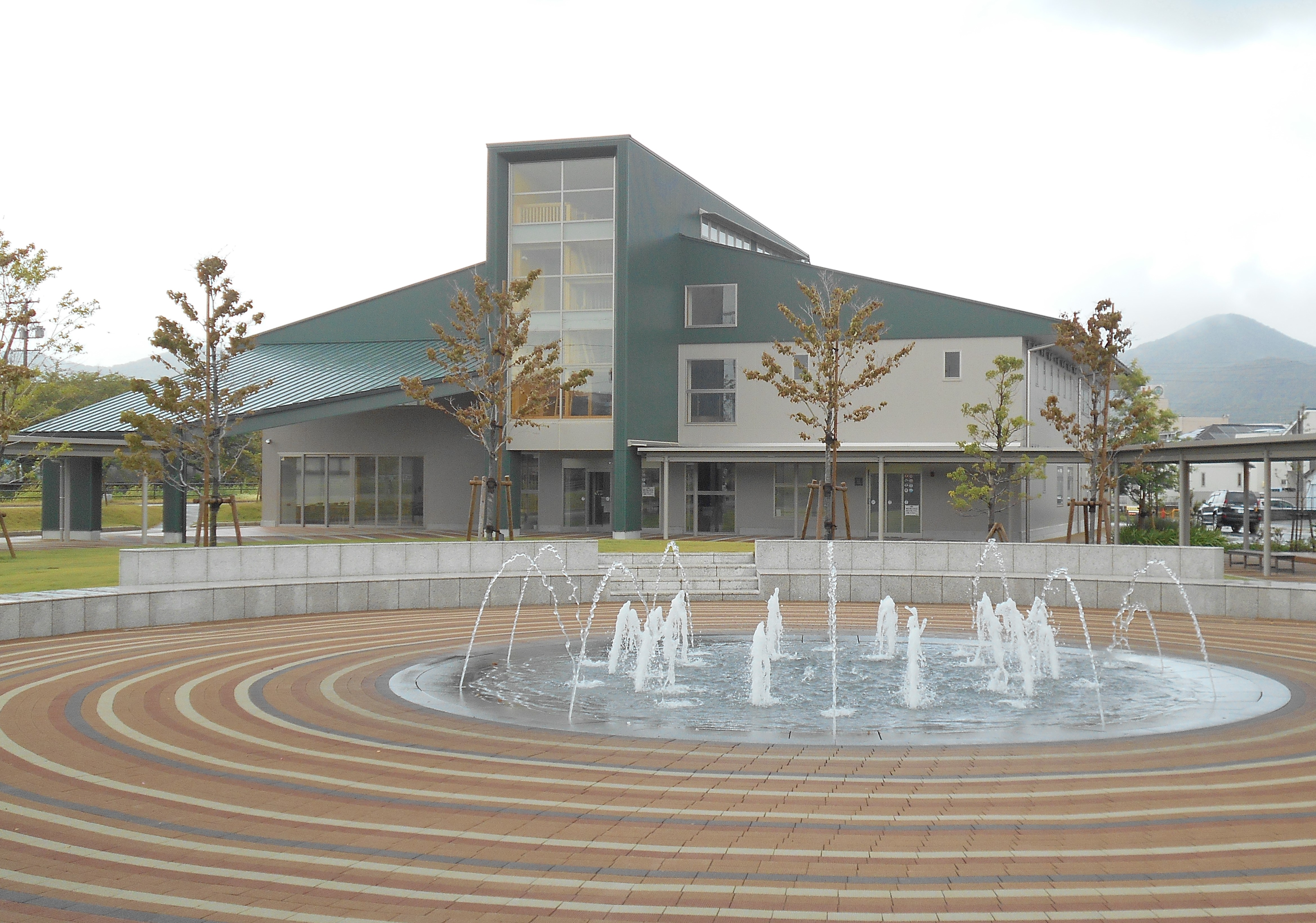 LaLaGran（ララグラン）内にある田原市親子交流館「すくっと」。手前は「まちなか広場」。撮影時は「すくっと」休館日で、台風10号が接近中だったこともあり、辺りは静まりかえっている。【2019年8月】